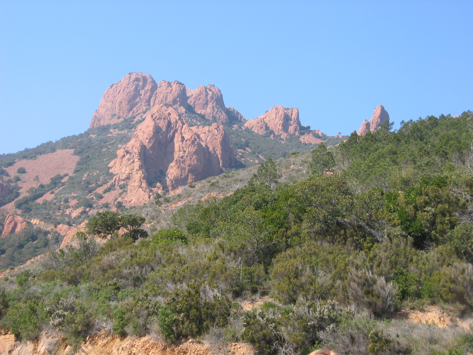 Le Massif de l'Esterel, Alpes-Maritimes, France Photo prise le 2 avril 2006 Aut : Jddmano